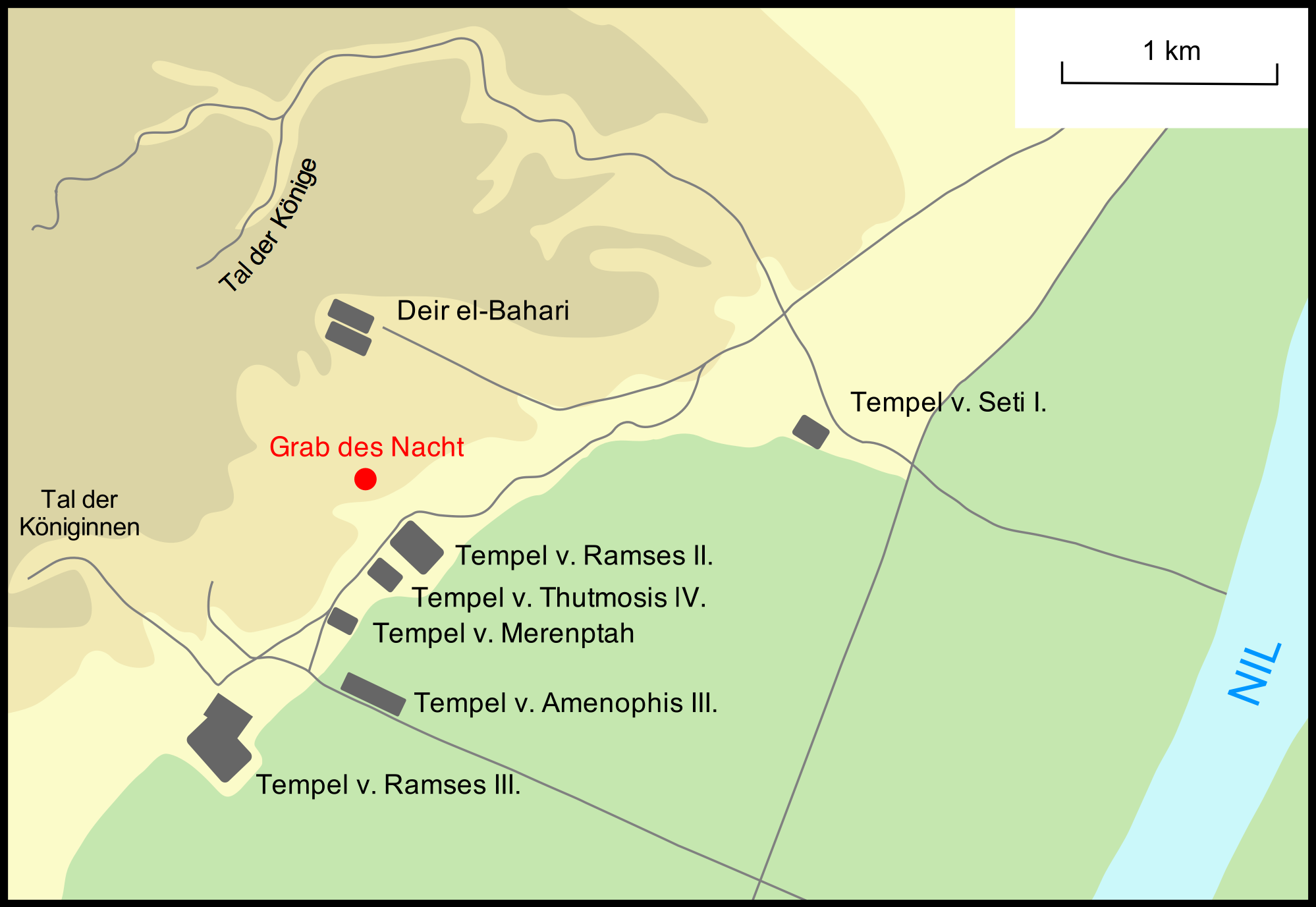 Karte zur Veranschaulichung der Lage des Grabs von Nacht